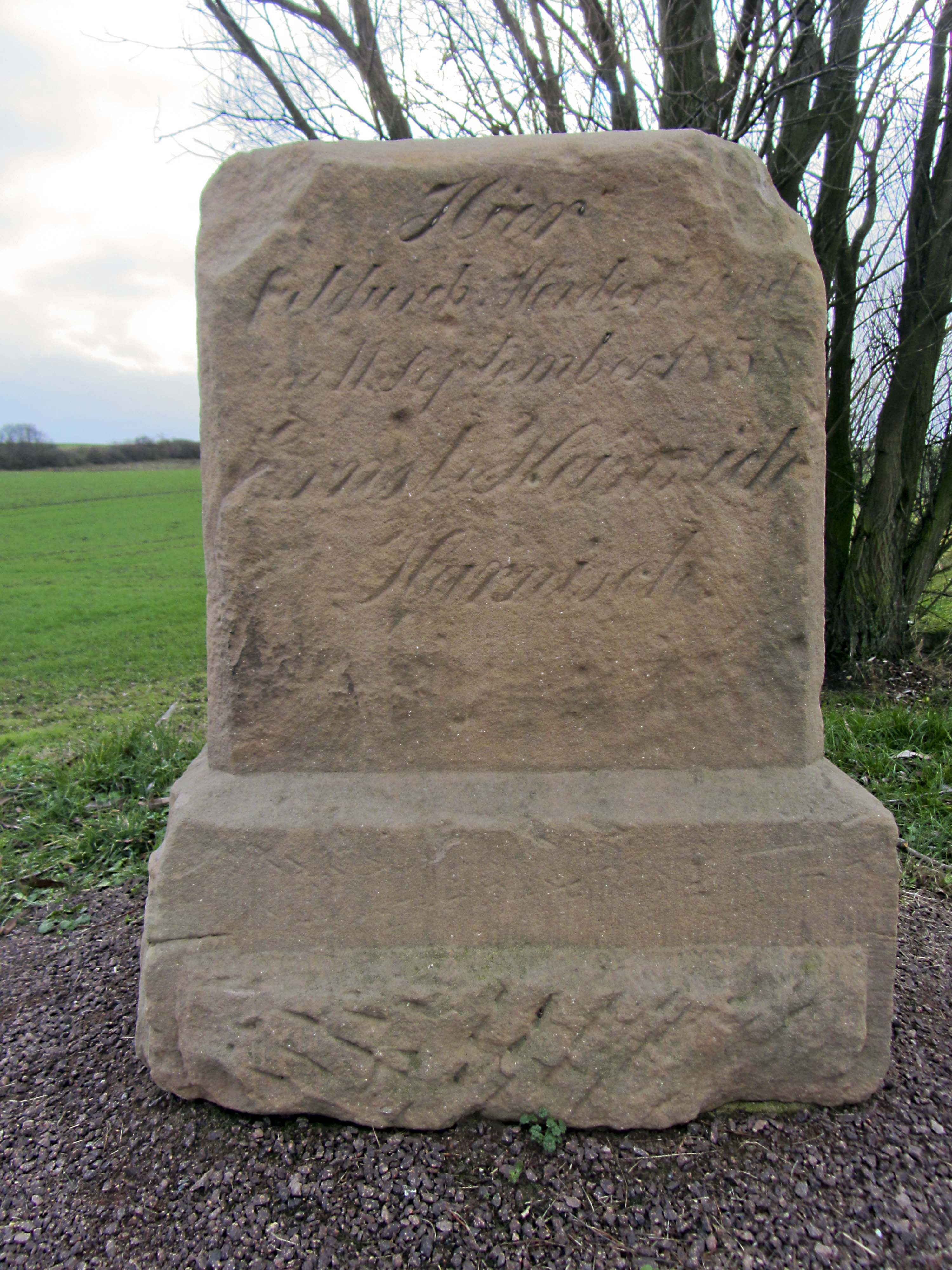 Mörderstein Lieskau